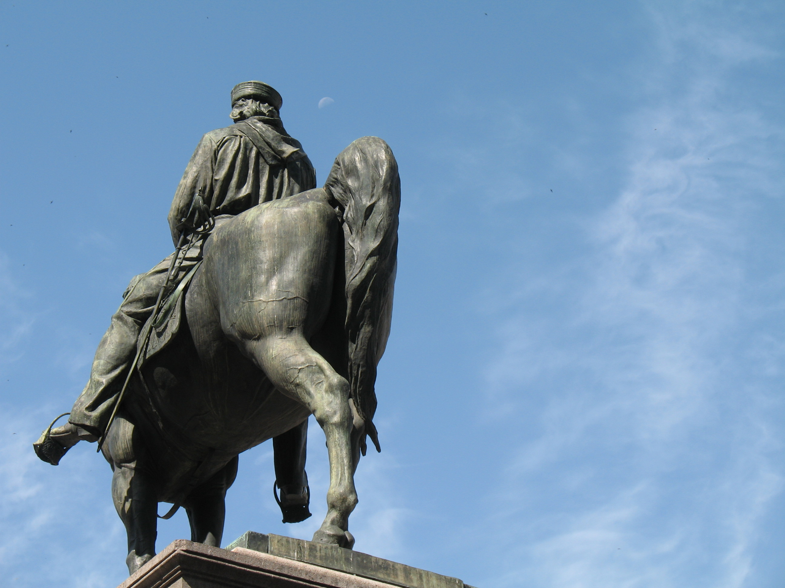 Statua a Giuseppe Garibaldi di Augusto Rivalta a piazza De Ferrari, Genova